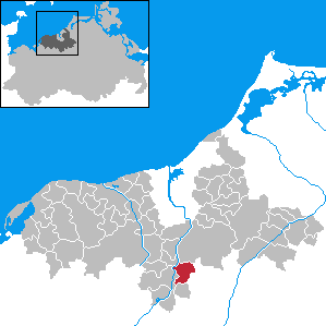 Wiendorf in Mecklenburg-Western Pomerania - District Bad Doberan